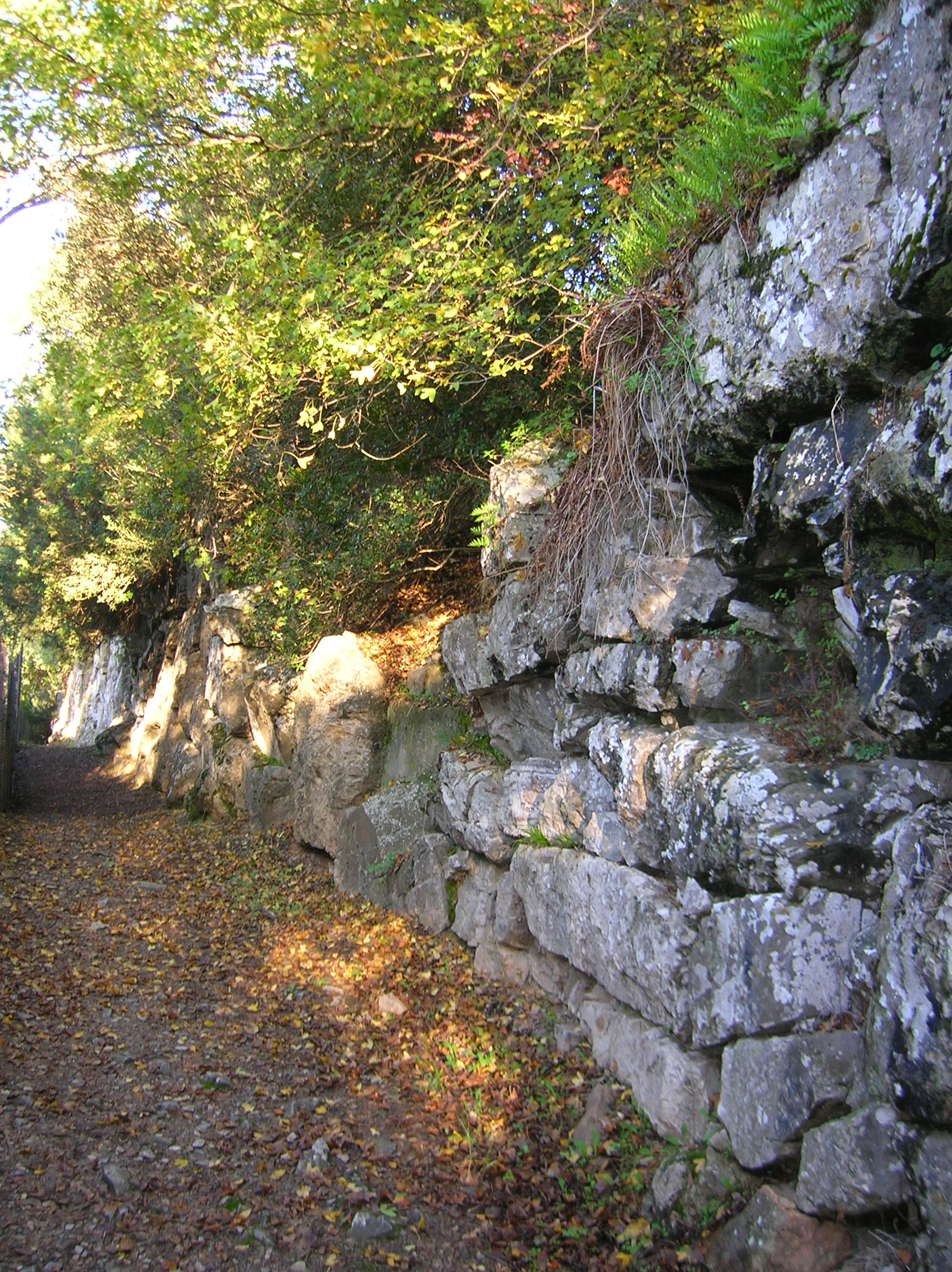 Mura etrusche Roselle, Toscana, Italia